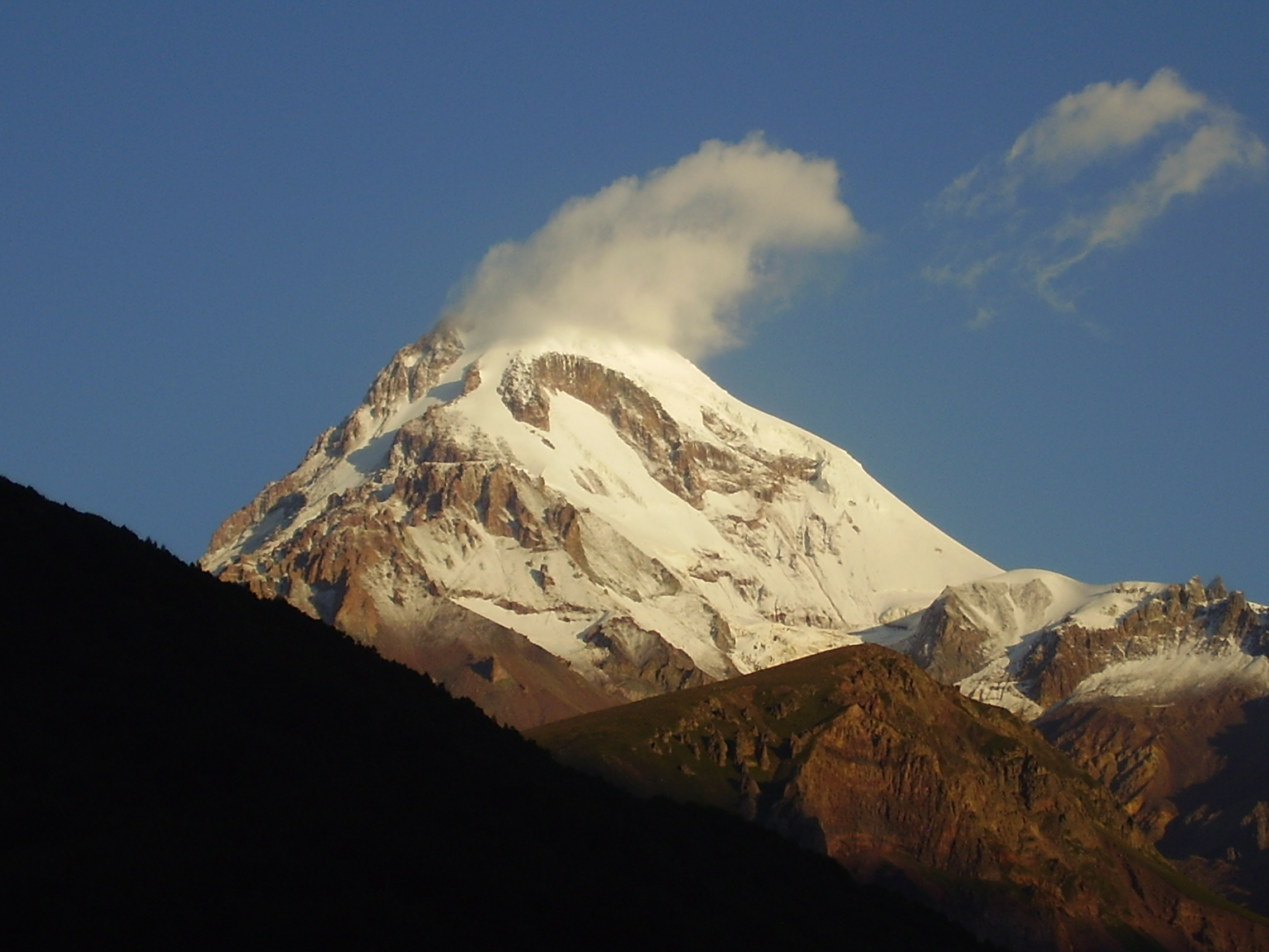 Казбек. Август 2011. Раннее утро